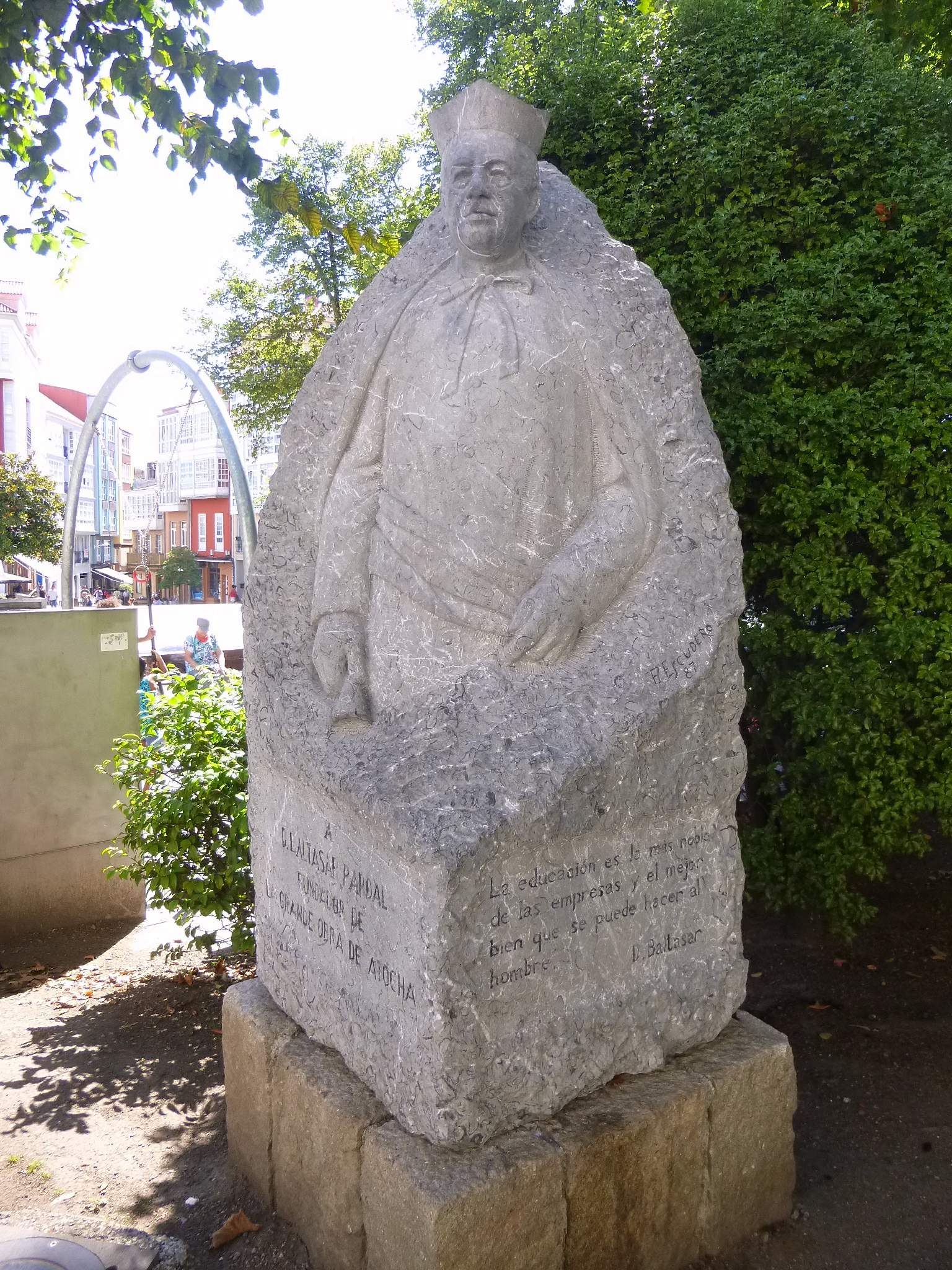 A Coruña - Monumento a Baltasar Pardal